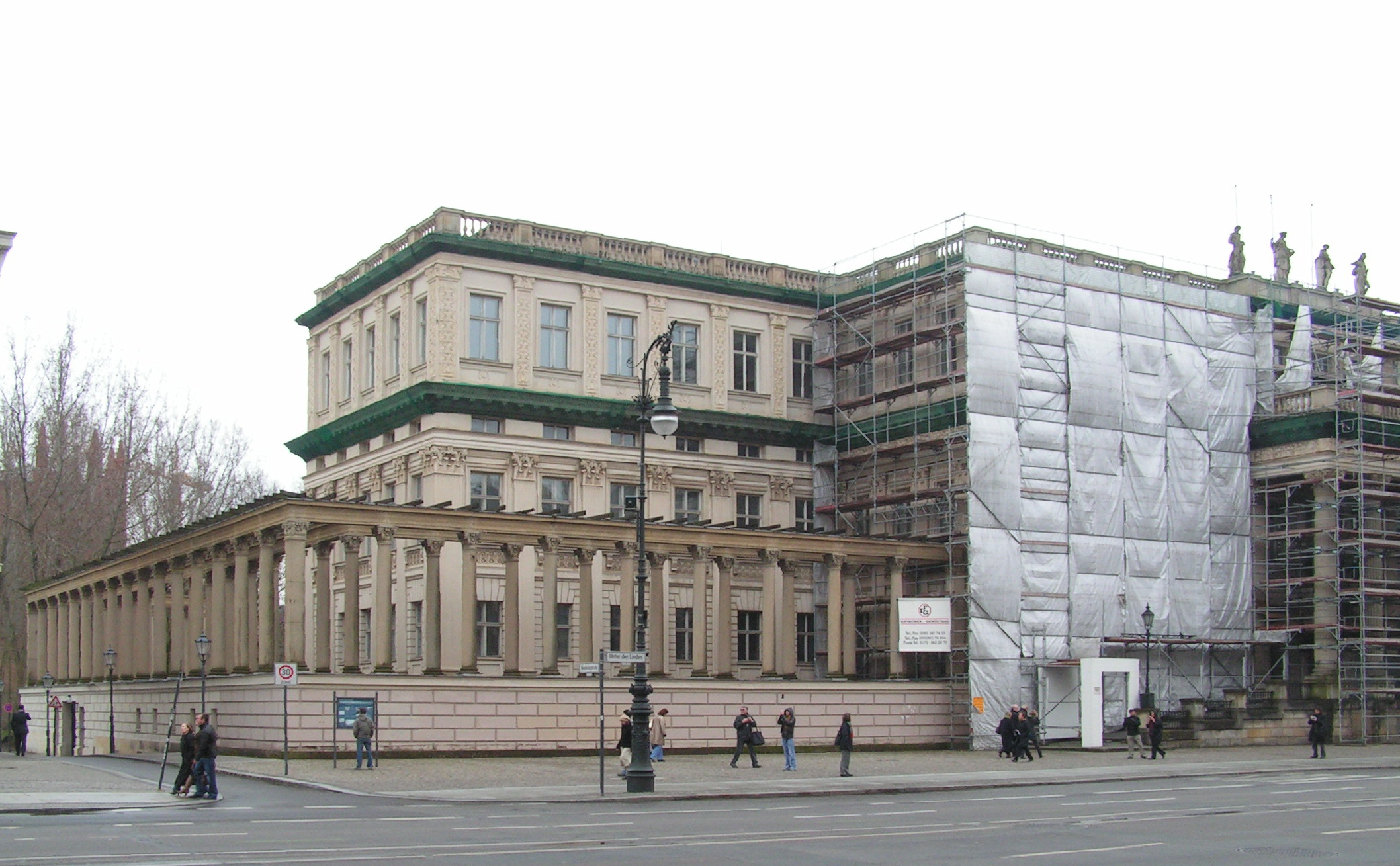 Kronprinzenpalais in Berlin, Germany. Front view.